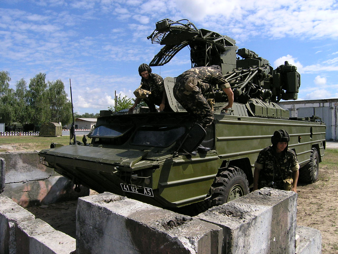 Бойова підготовка: на заняттях з бойової підготовки